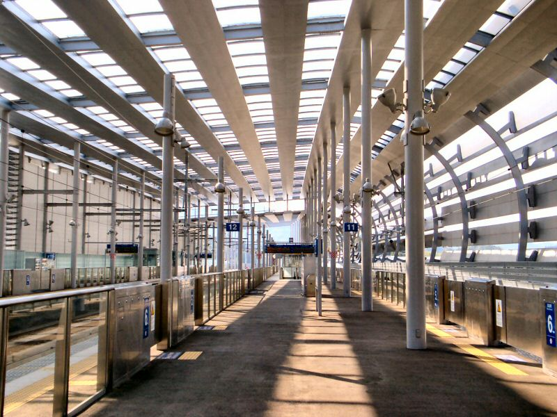 新水俣駅 内観 写真奥が鹿児島中央駅方面。 設計者 : 渡辺誠+西部交通建築事務所 撮影者/著者/著作権保有者 : MK Products (本人がアップロード) 撮影日 : 2004/11/23 新水俣駅用にアップロードした画像です。良い画像があれば別の画像に変えてください。